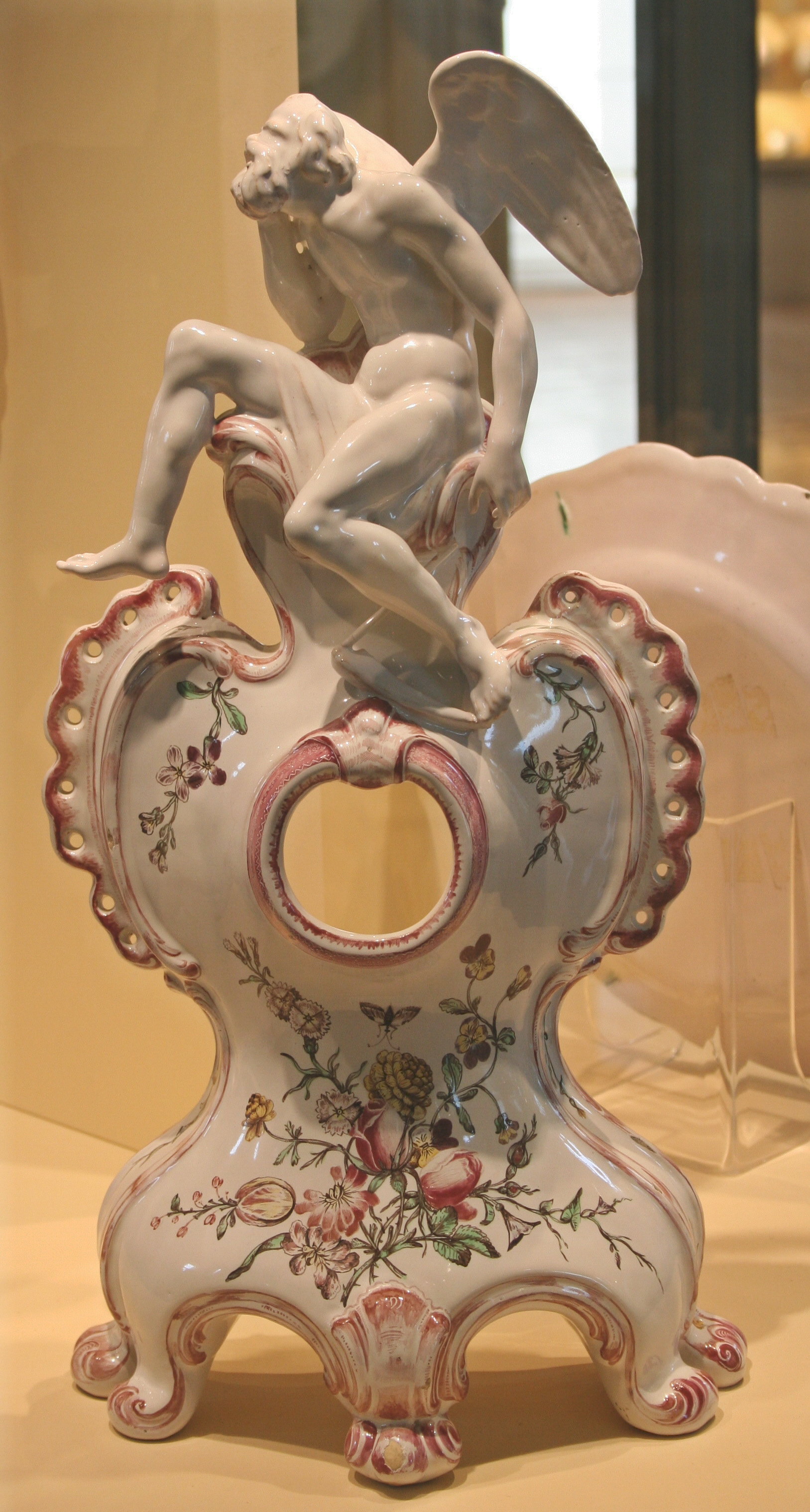 Musée de la faïence à Marseille. Porte montre en faïence stannifère décor petit feu polychrome, atelier d'Honoré Savy (1765/1770). De forme rocaille, ce porte montre présente au sommet l'allégorie du temps figurée par un homme assis, barbu, et nu, pourvu d'ailes et doté d'une faux, symbole de la mort. Hauteur 43cm.